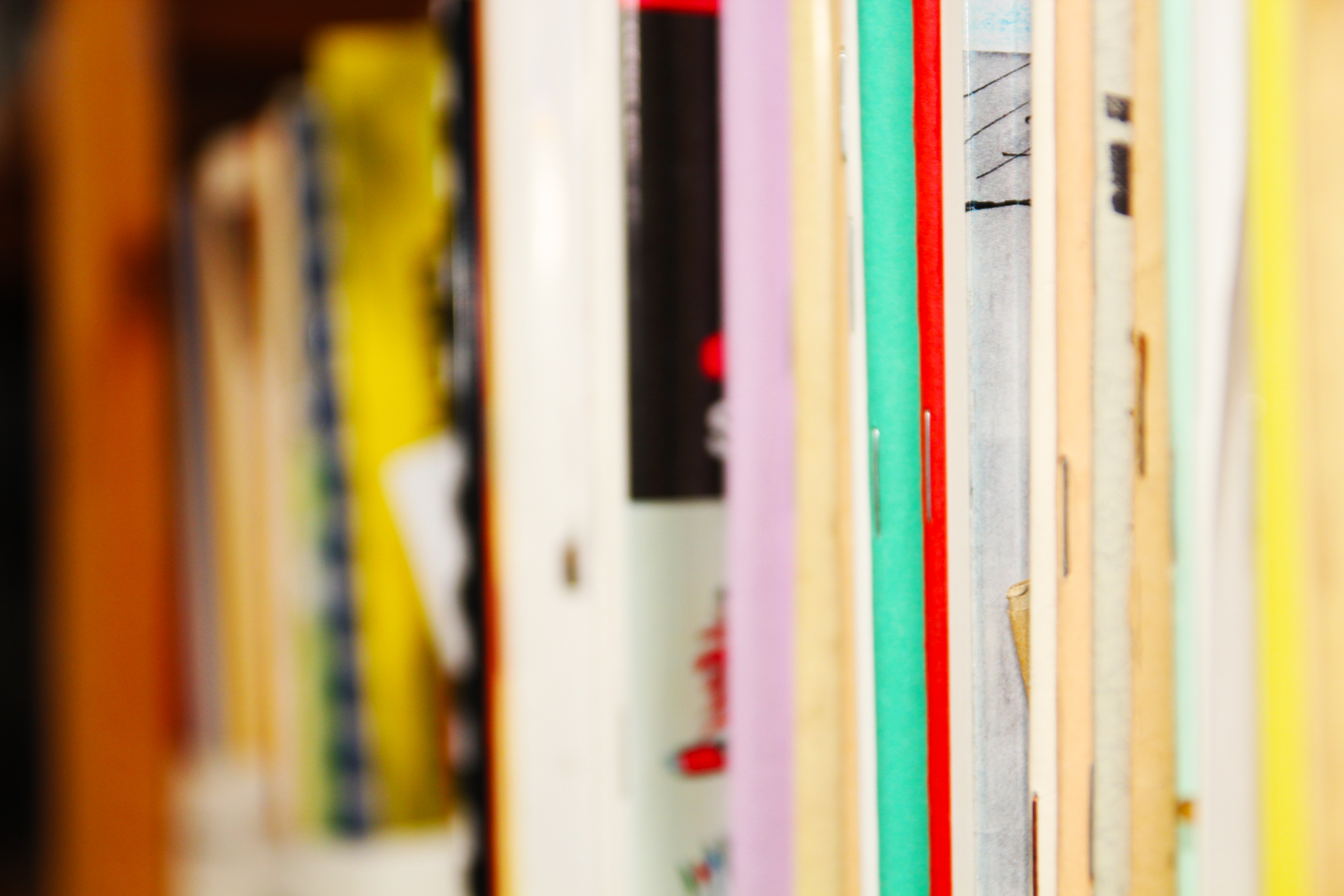 Fanzines stehen im Archiv der Jugendkulturen in einem Regal